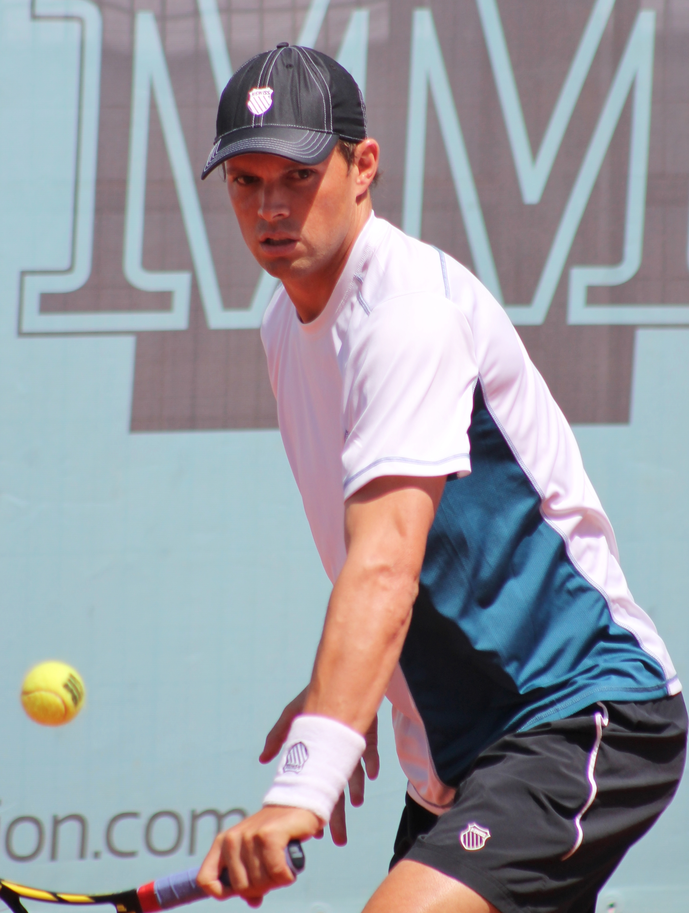 Bryan B. MA14 (5)